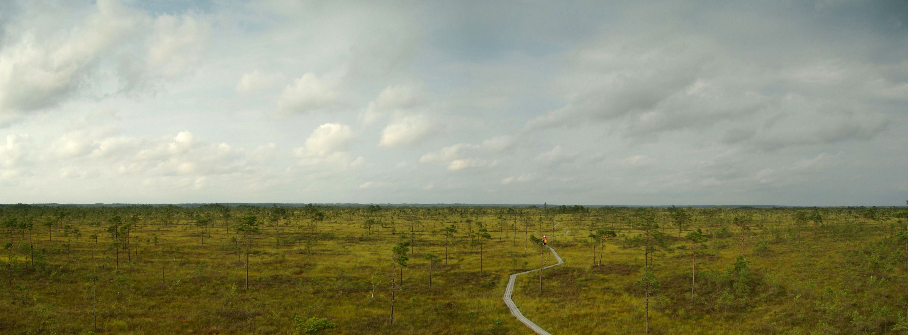 Kuresoo on üks Eesti suurimaid suhteliselt hästi säilinud kompaktseid soid ning kuulub Soomaa rahvuspargi kooseisu.